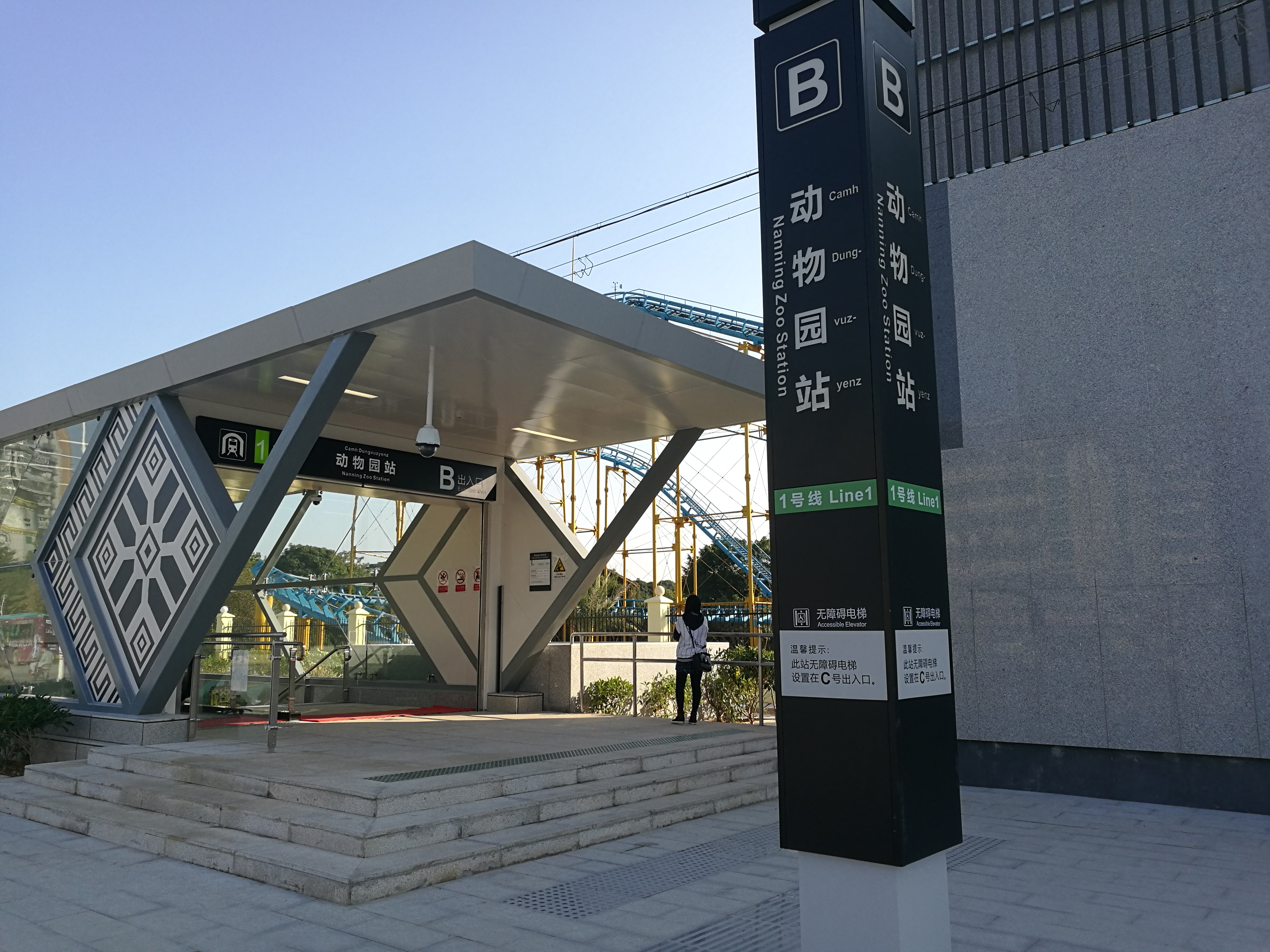 南宁轨道交通动物园站